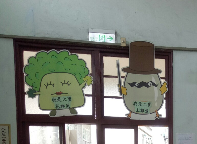 台鐵路竹車站“路竹四寶”裝飾。